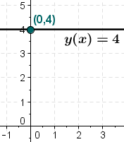 Константна функција